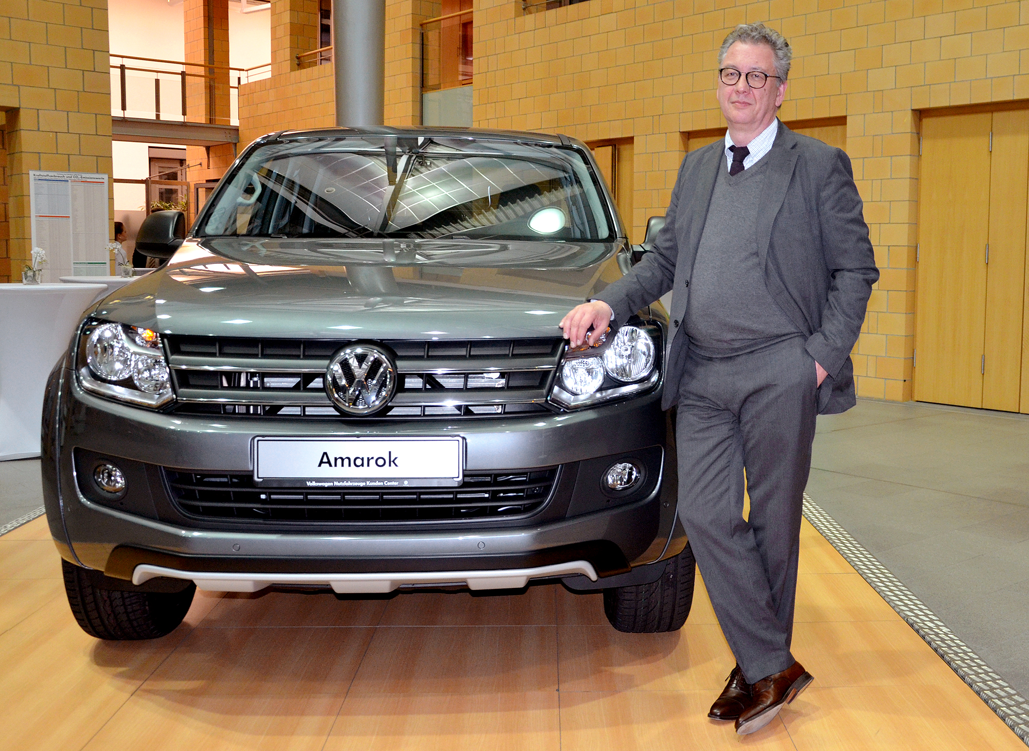 Volker Seitz, Pressesprecher Unternehmenskommunikation Volkswagen AG Nutzfahrzeuge, hier neben einem Amarok im Kundencenter am Volkswagenwerk Hannover ...